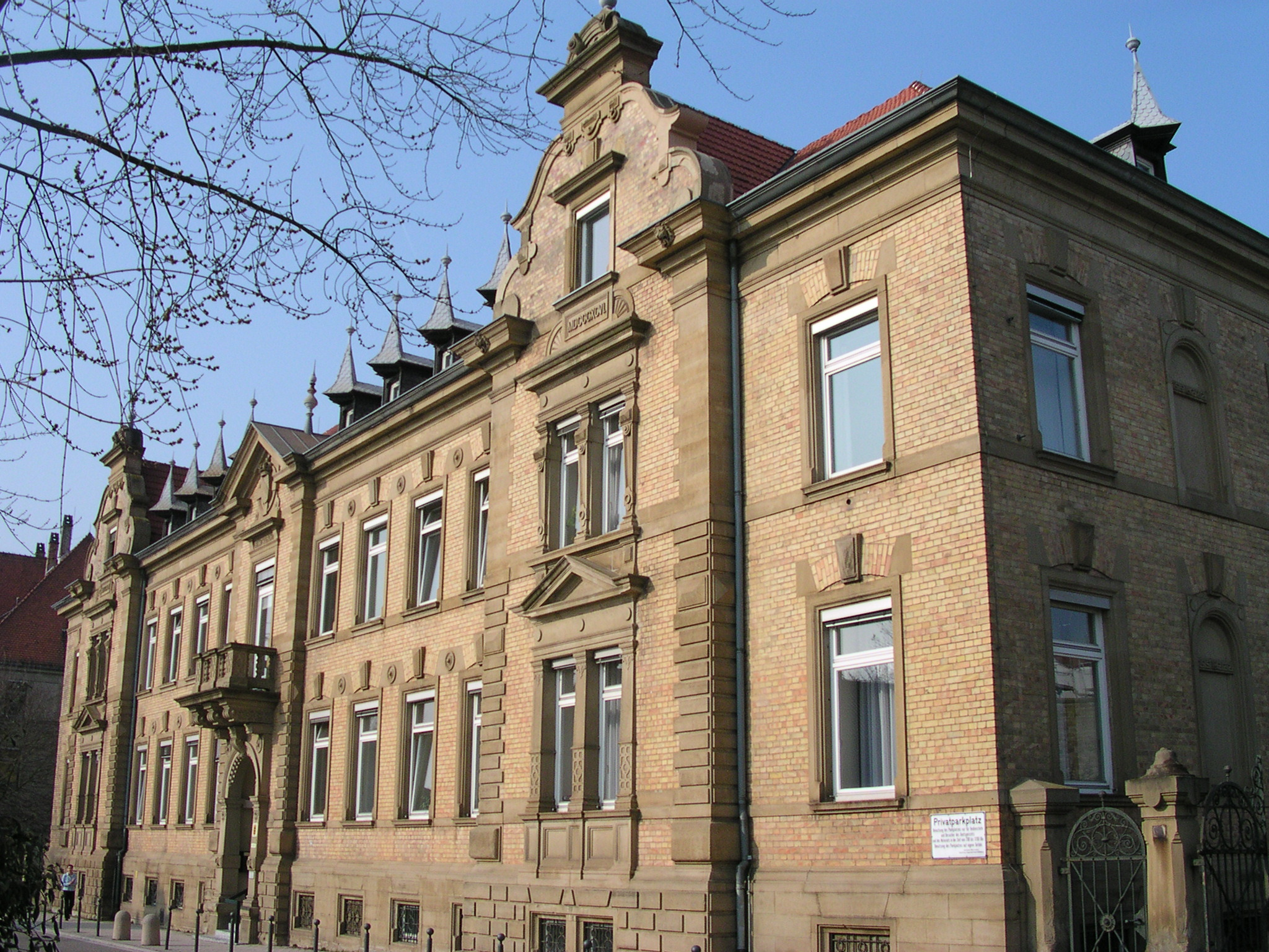 Von 1894 bis 1896 baute man an der Werderstraße das ehemals großherzoglich-badische Amtsgericht. Architekt war Julius Koch, Vorstand der Bezirksbauinspektion Heidelberg. Fassade mit Steinmetzarbeiten und schmuckreichen Giebeln, Landeswappen mit Krone.